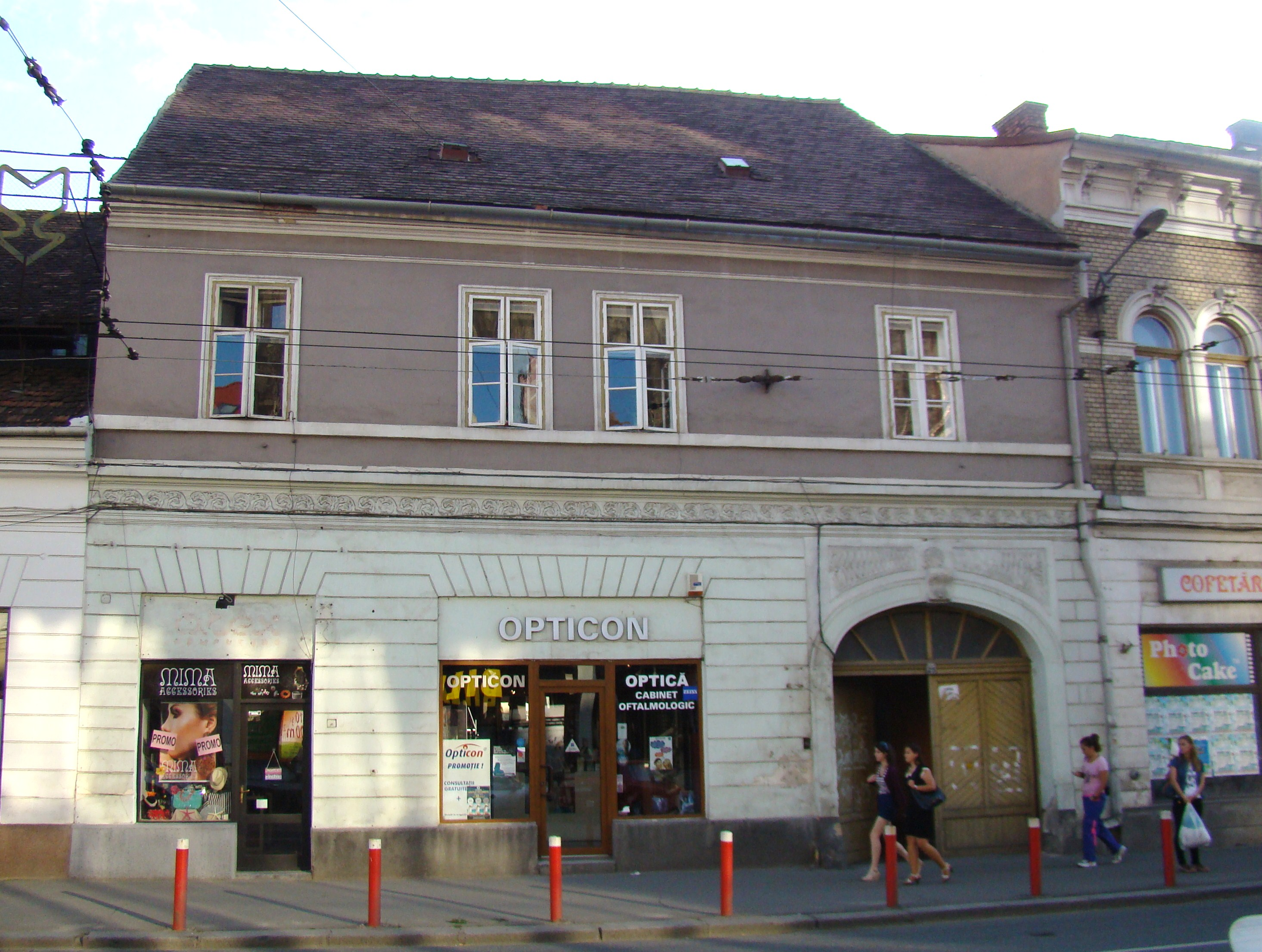 Clădire monument istoric, str.Regele Ferdinand nr.25